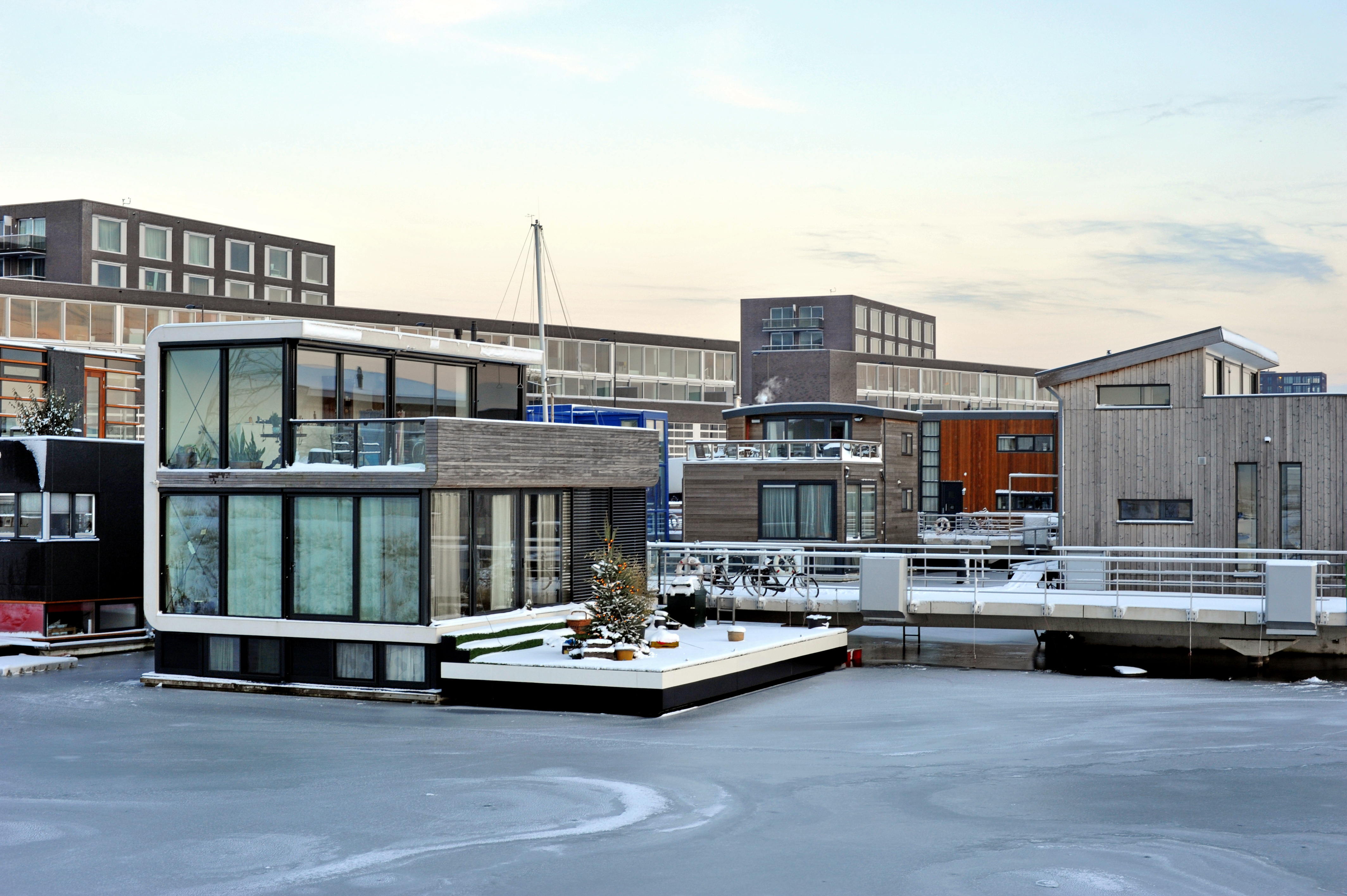 IJburg West, Amsterdam, Netherlands